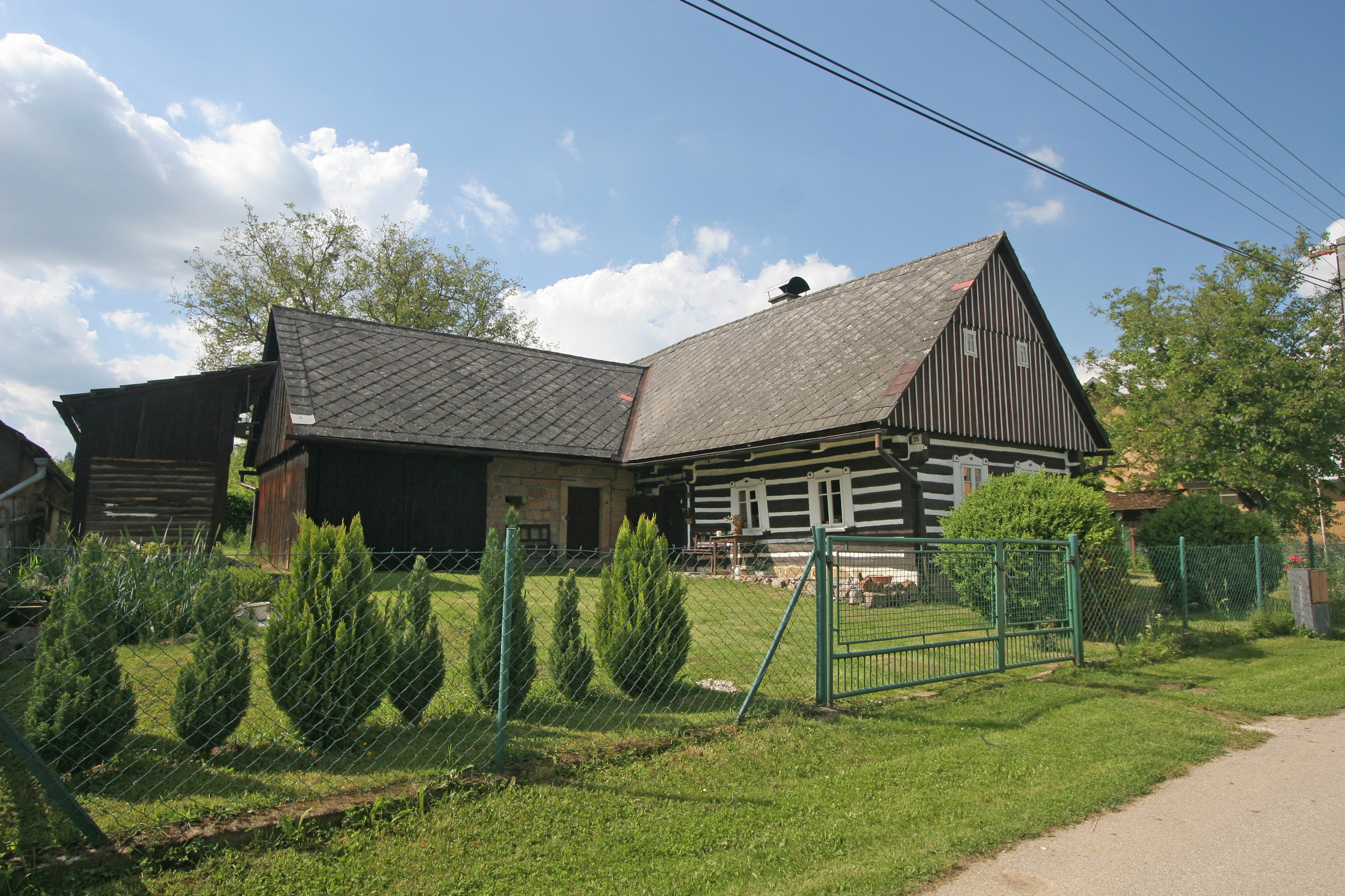 Lány čp. 35